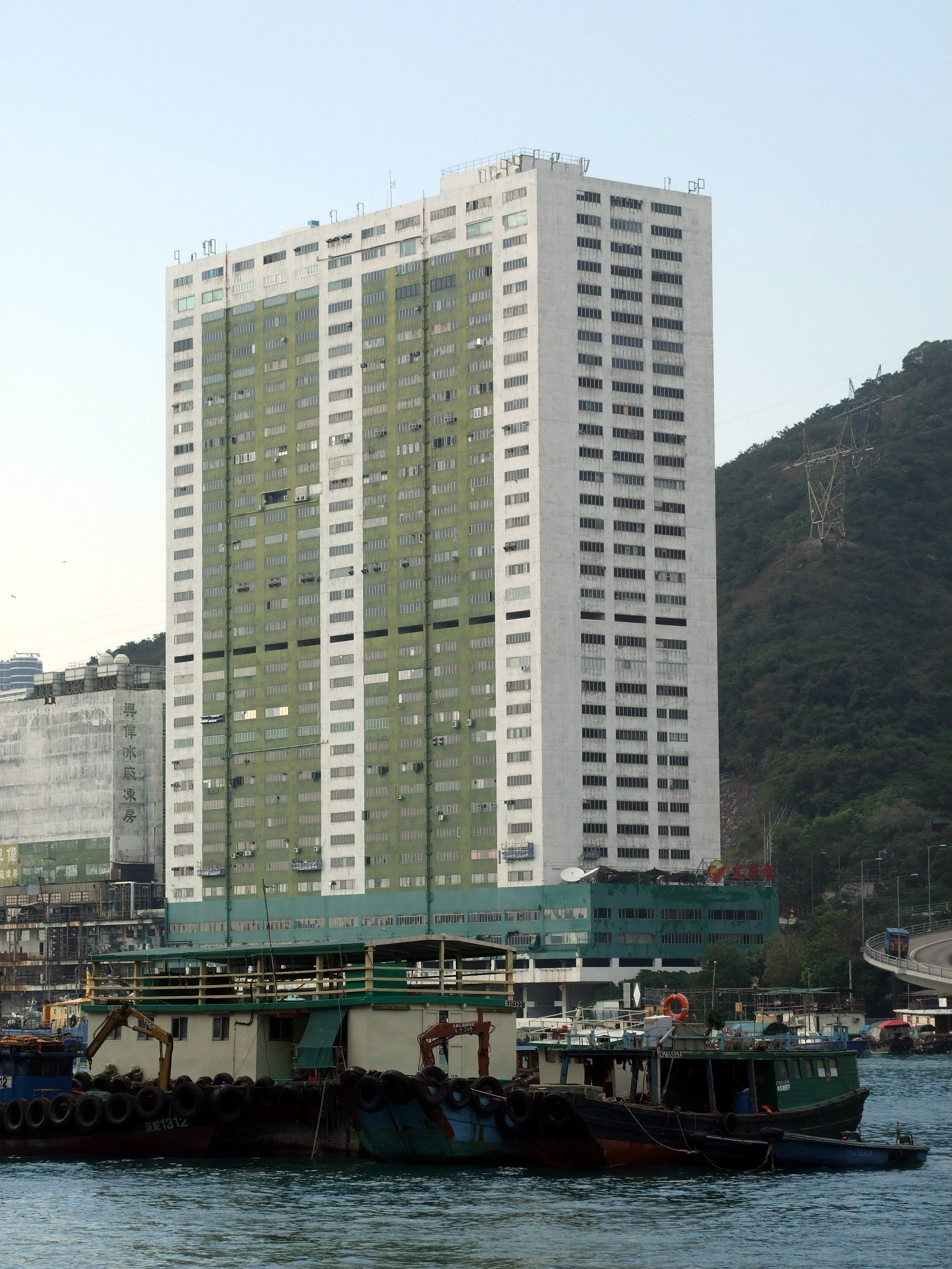 中文（香港）: 田灣興偉中心